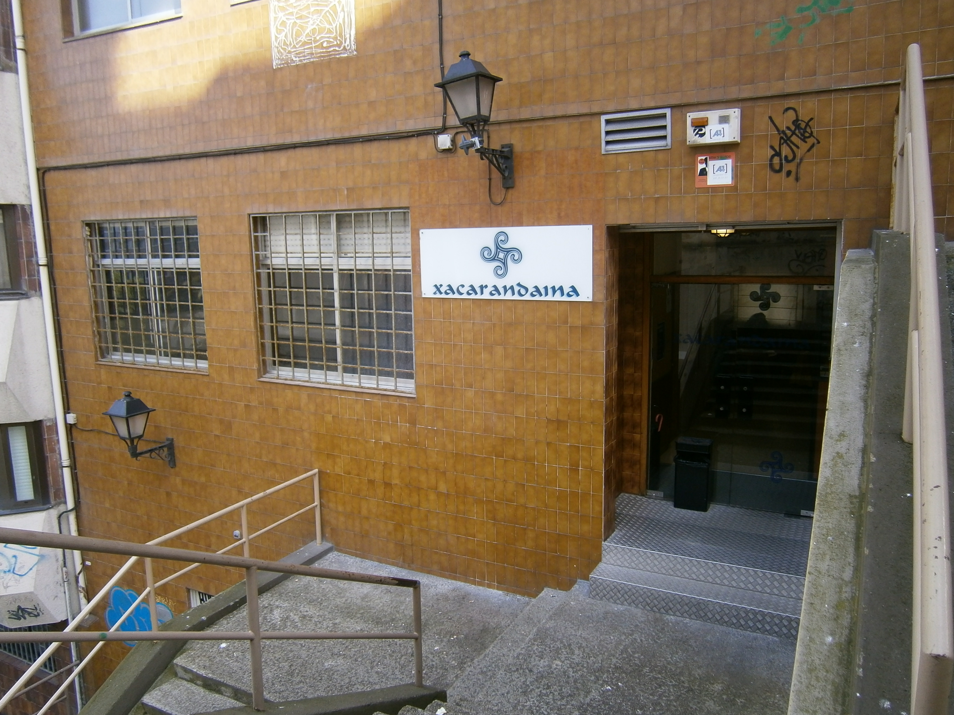 Sede da Agrupación Cultural Xacarandaina